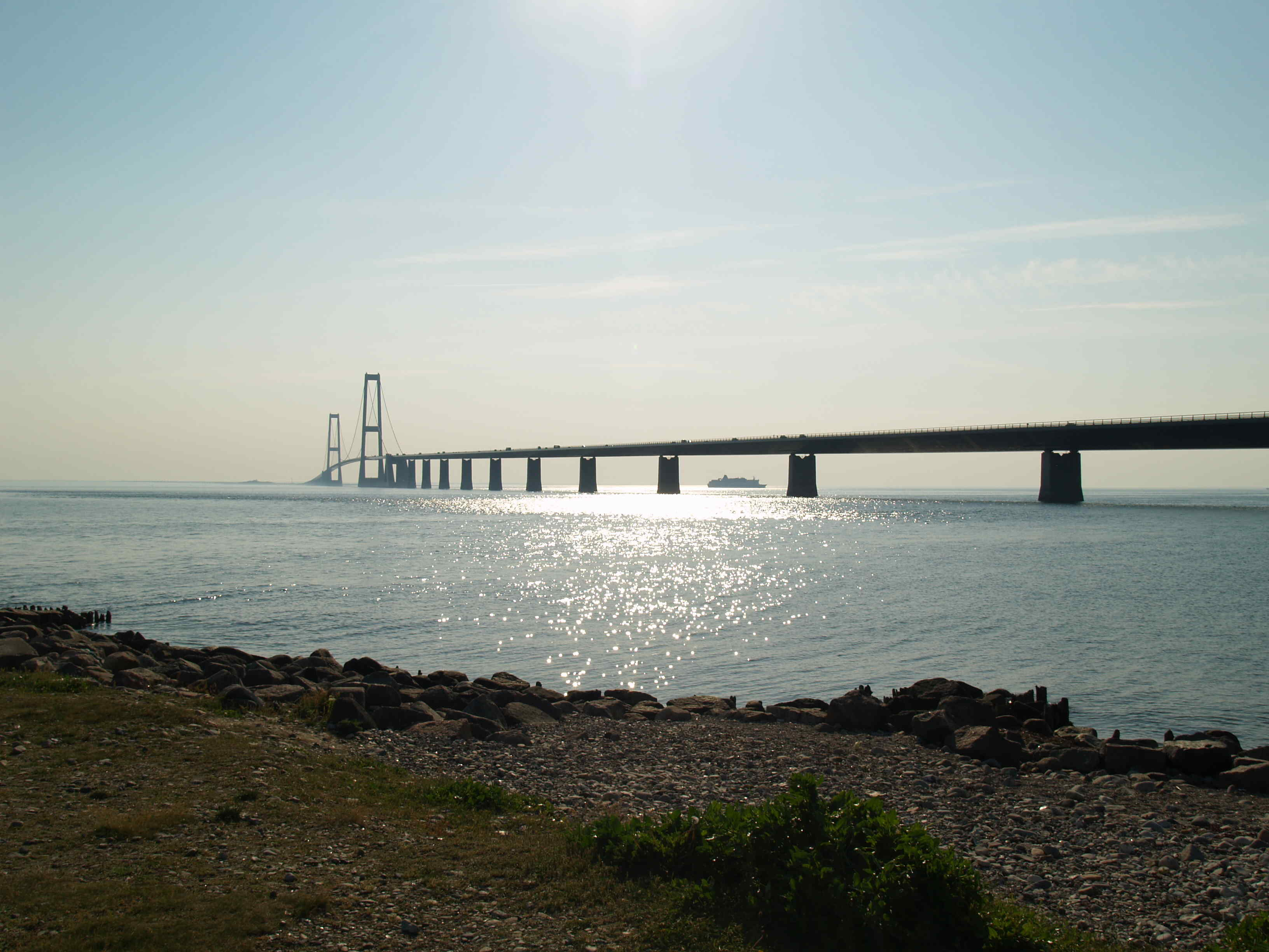 Storebælt-Brücke